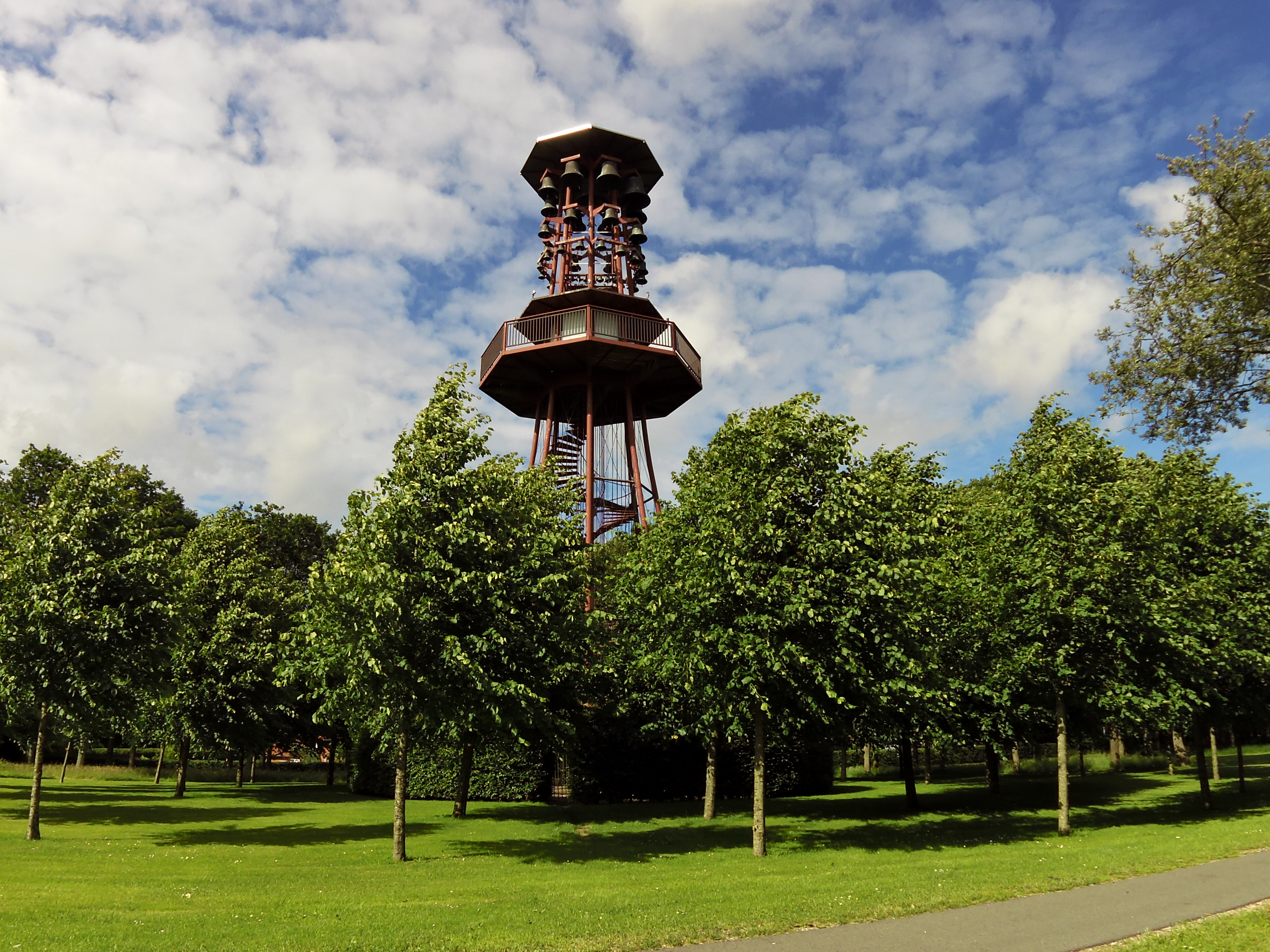 Kong Frederik IX's Klokkespil i Løgumkloster